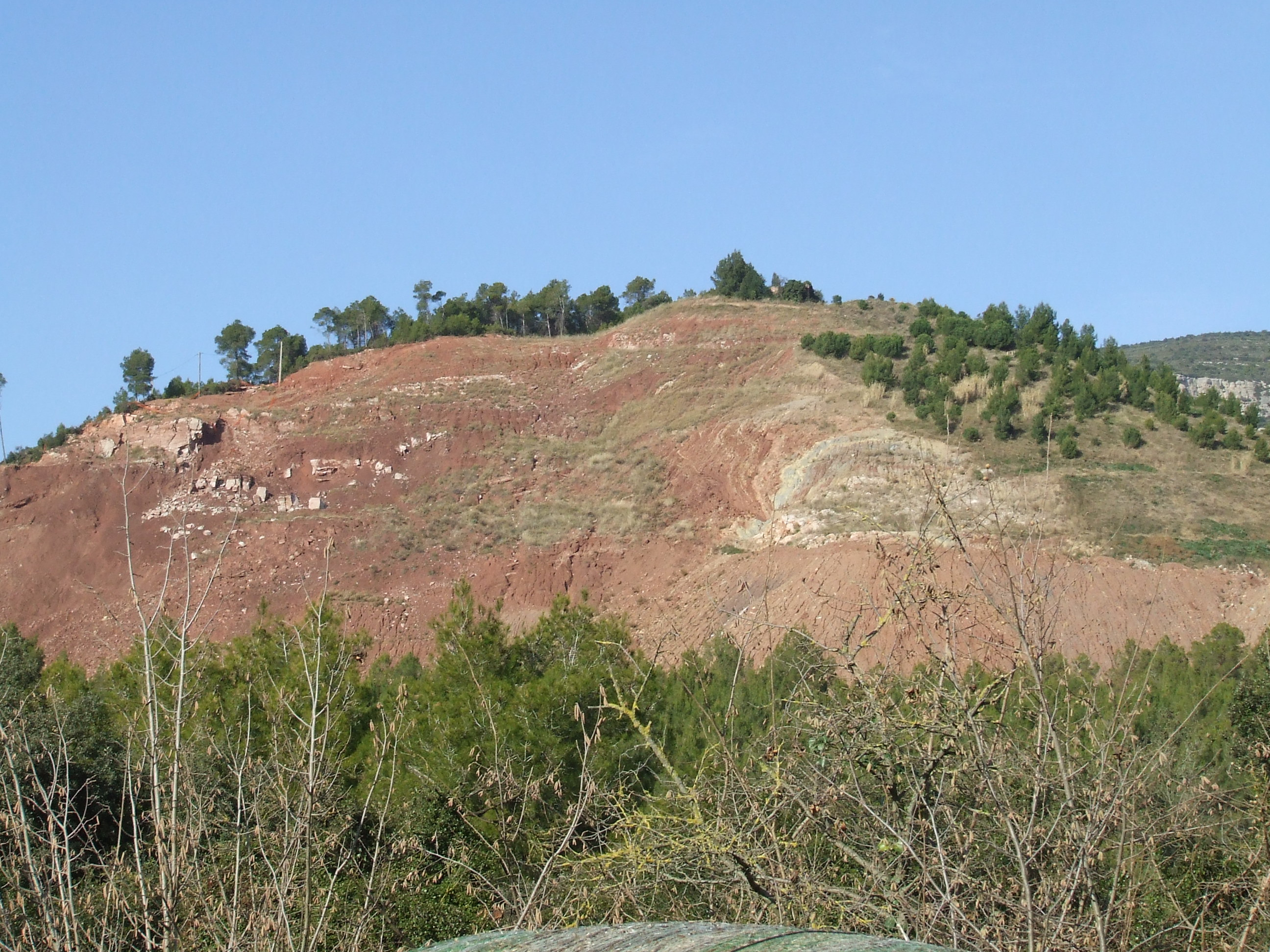 La Pedrera del Rieral, o de Can Margarit (Riells del Fai, Bigues i Riells, Vallès Oriental).